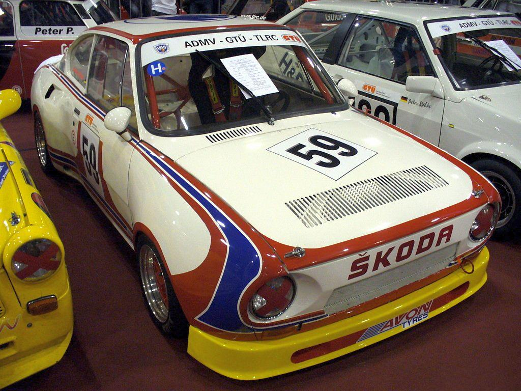 Škoda 130RS